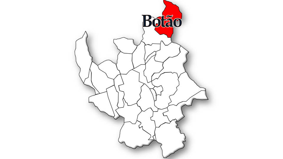 População